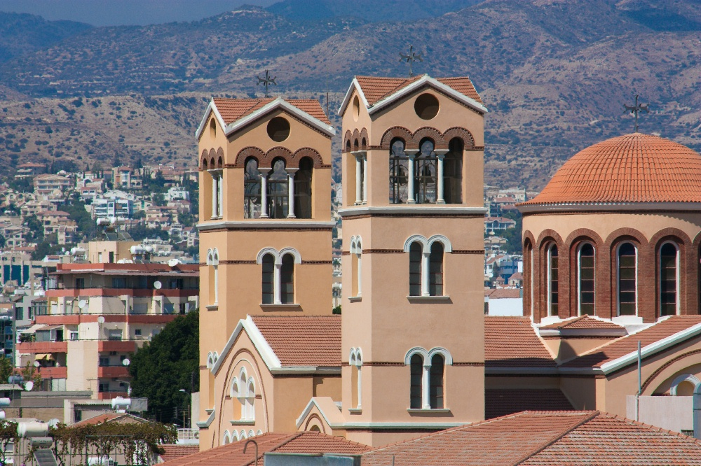 Limassol 0325